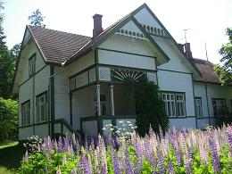 Kotkaniemen päärakennus kauniine takakuisteineen.